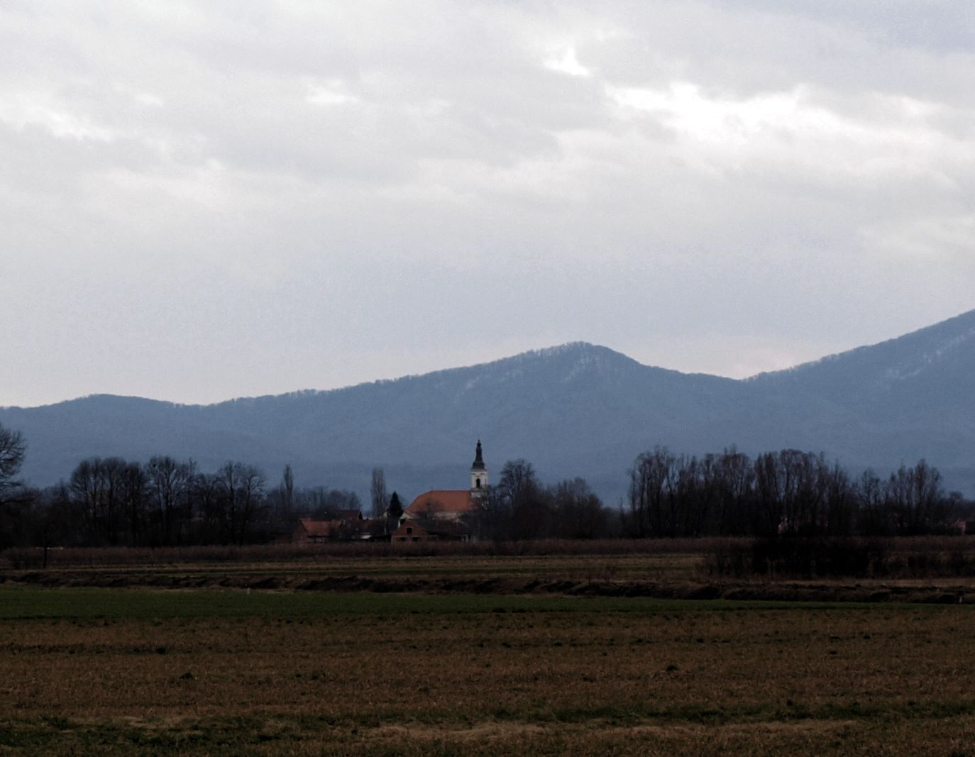 Selo Bebrina iz Brodsko-posavske županije